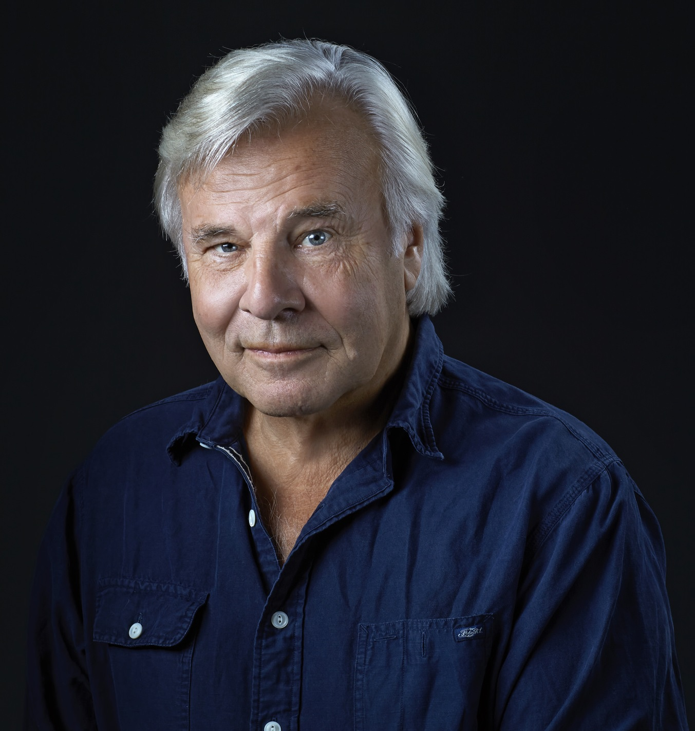 Författaren och journalisten Jan Guillou.